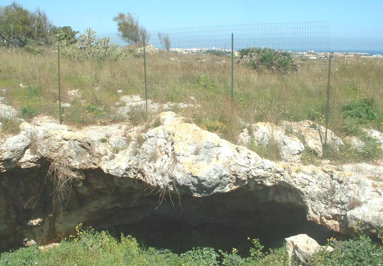 Pachino (SR), The entrance of Grotta Calafarina, a cave near Marzamemi.